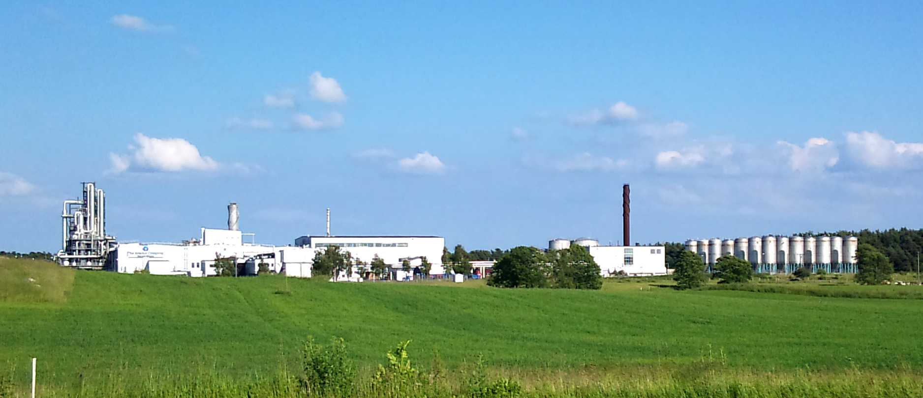 Absoluts bränneri i Tings Nöbbelöv, från väg 19